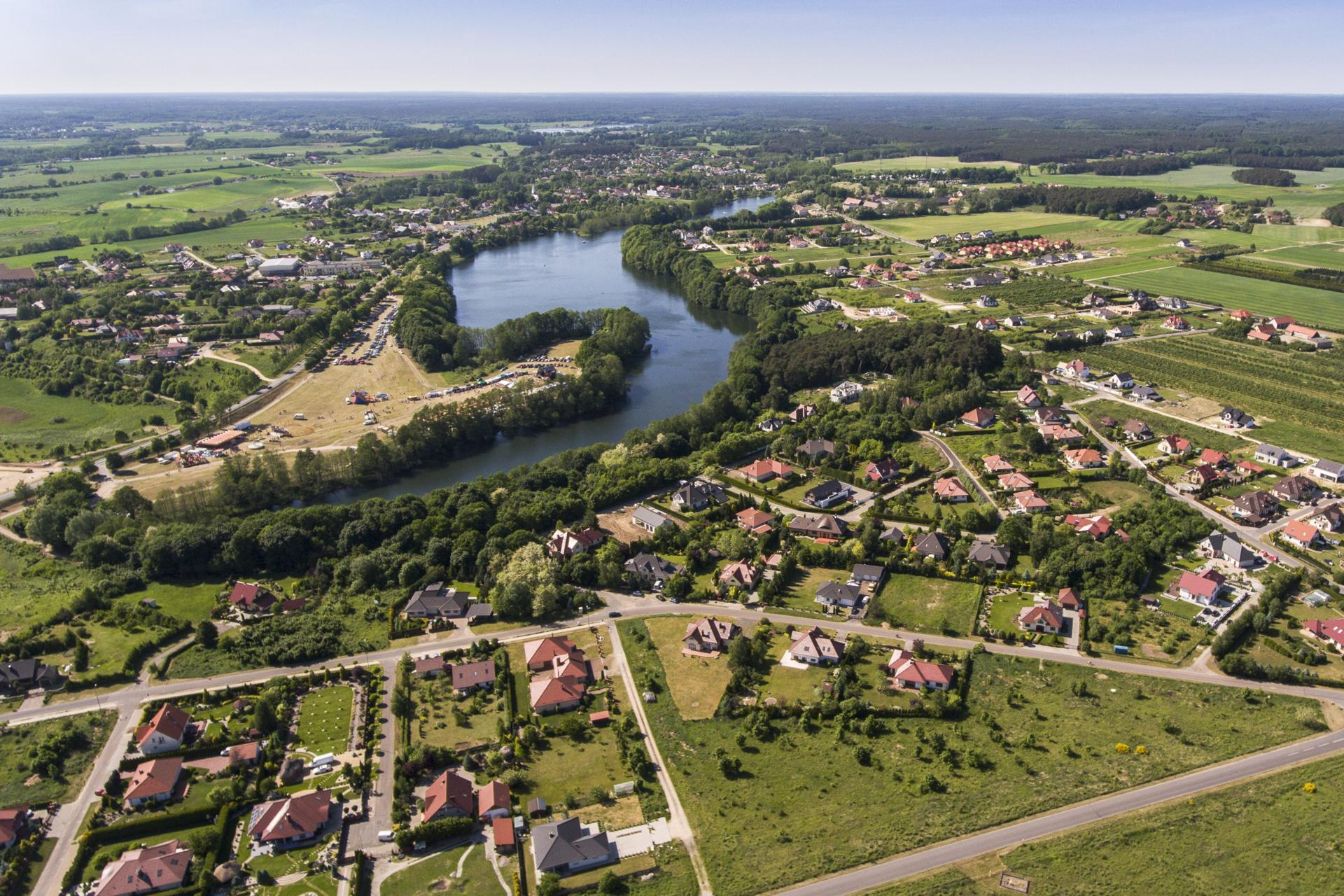 Kłodawa z lotu ptaka